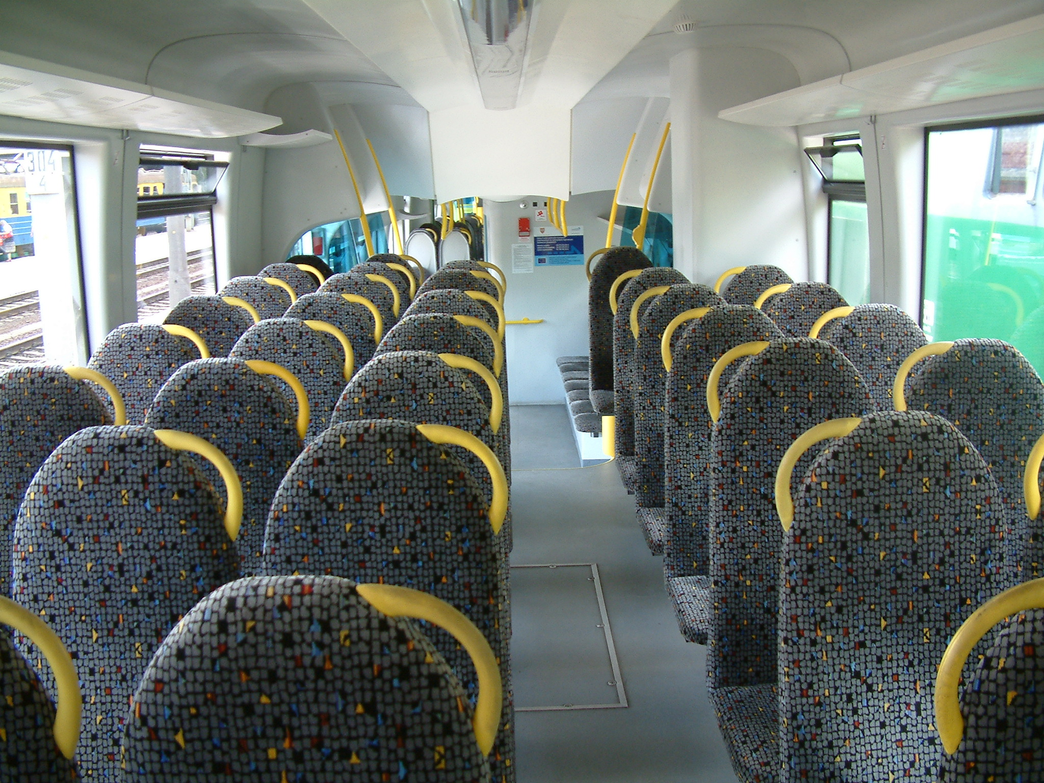 DMU SA132-008 in Poznań, interior